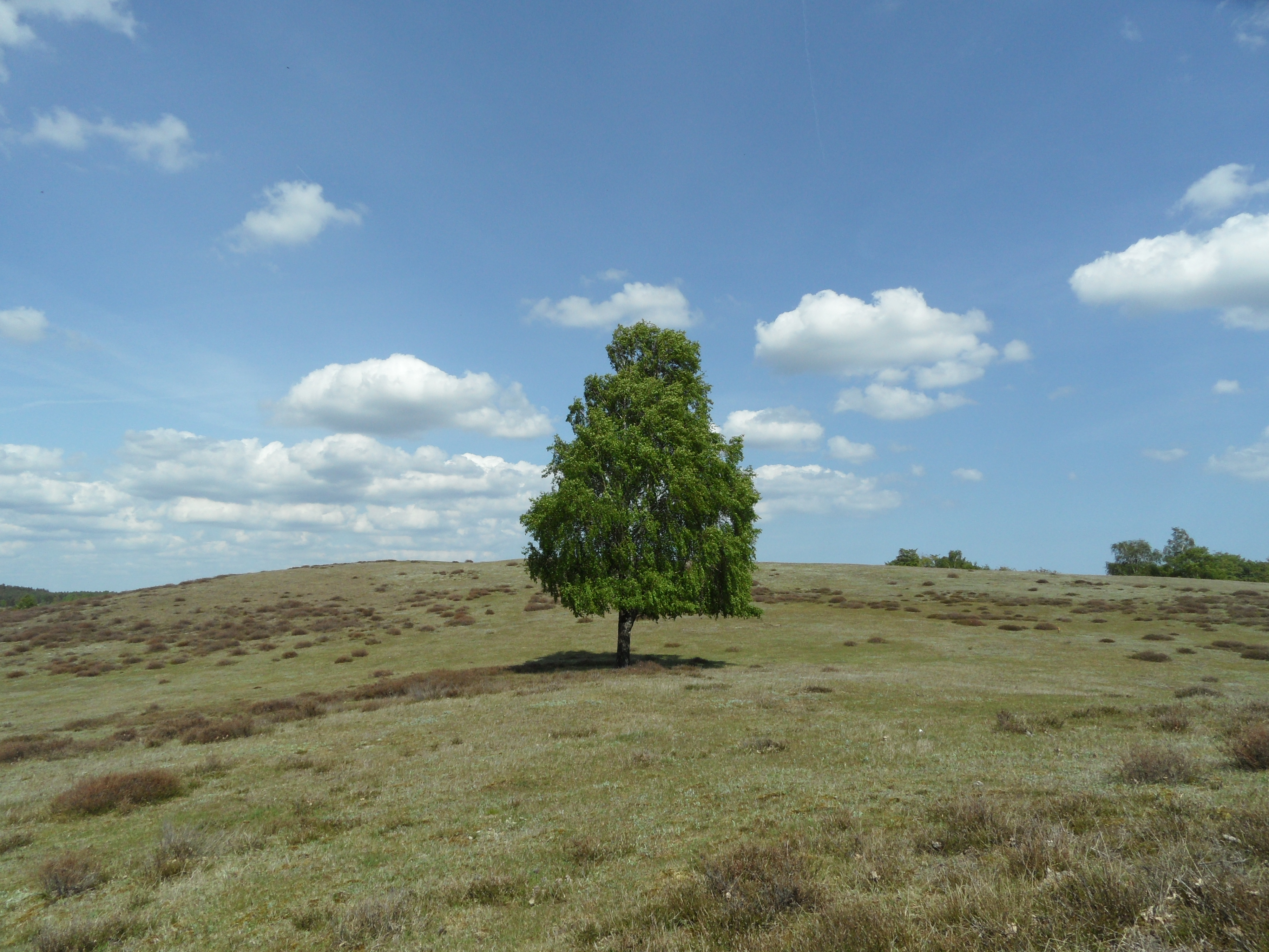 En ensam björk (Betula sp.) i ett hedlandskap, Drakamöllan naturreservat, Tommelilla kommun, Skåne, Sverige.